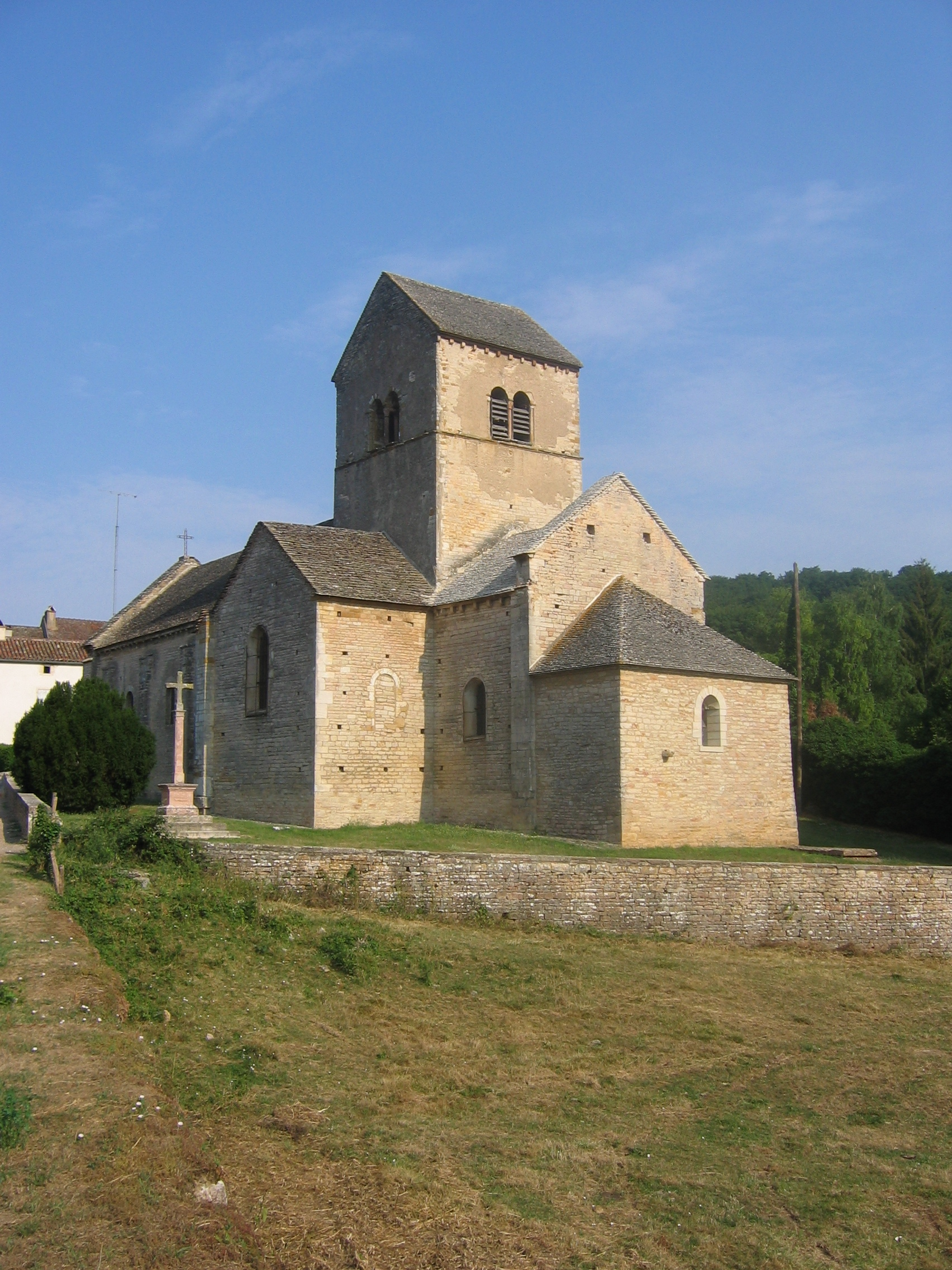 Ozenay, Saône-et-Loire, Bourgogne, France. L'église du village.